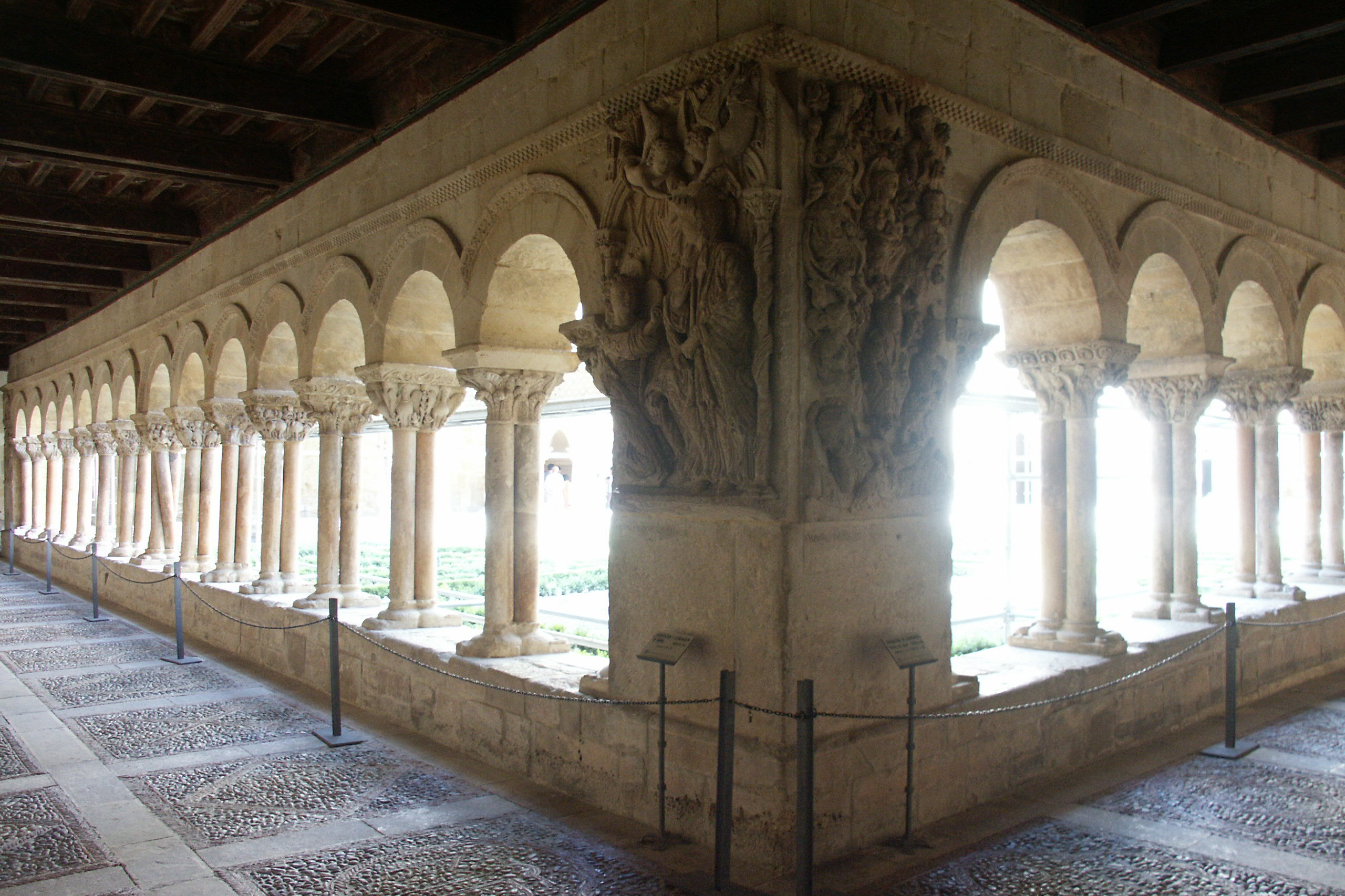 Kreuzgang Santo Domingo de Silos